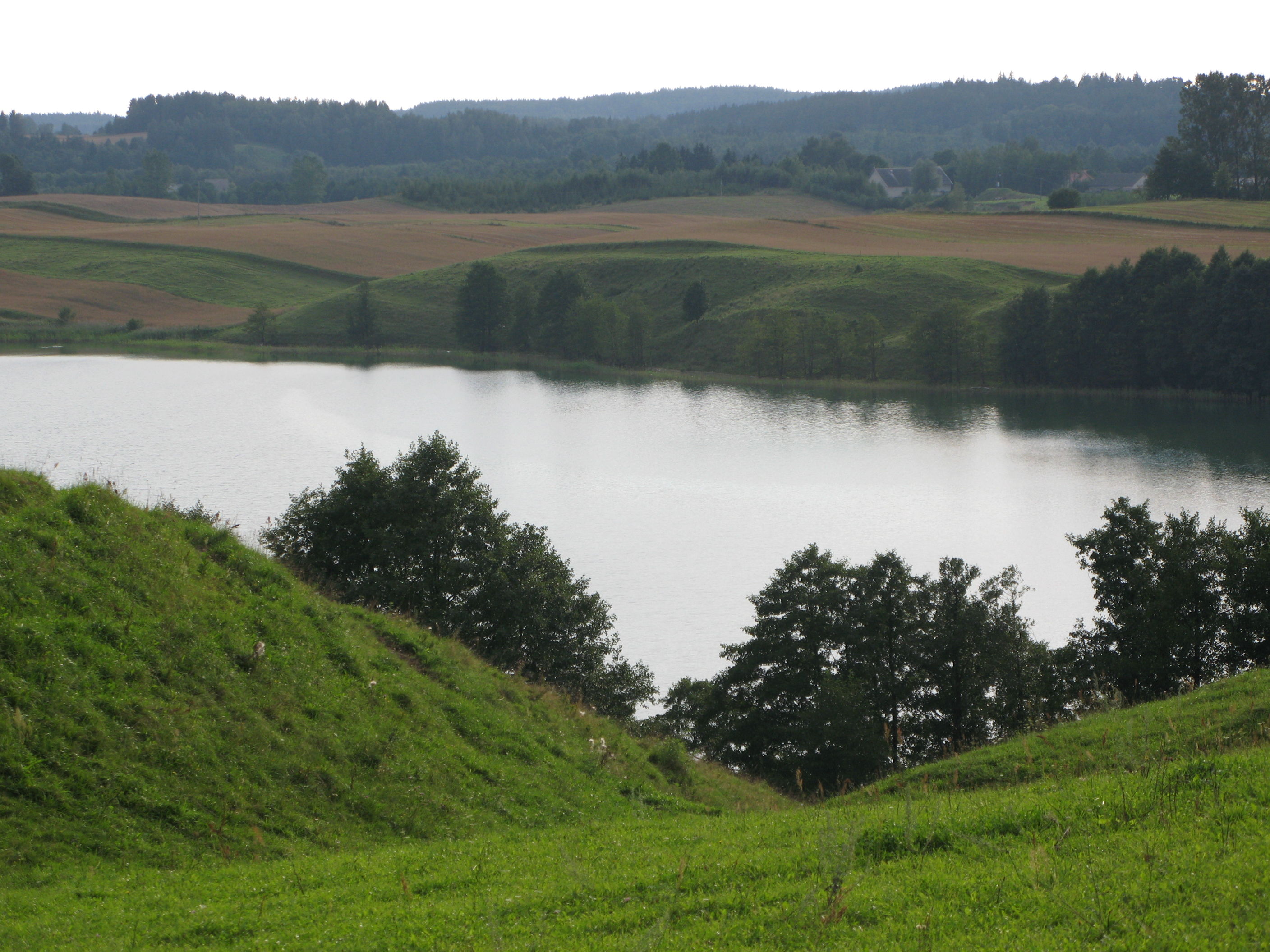 Boczne lake, Poland, Suwalki region